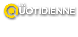 kskskskskskz